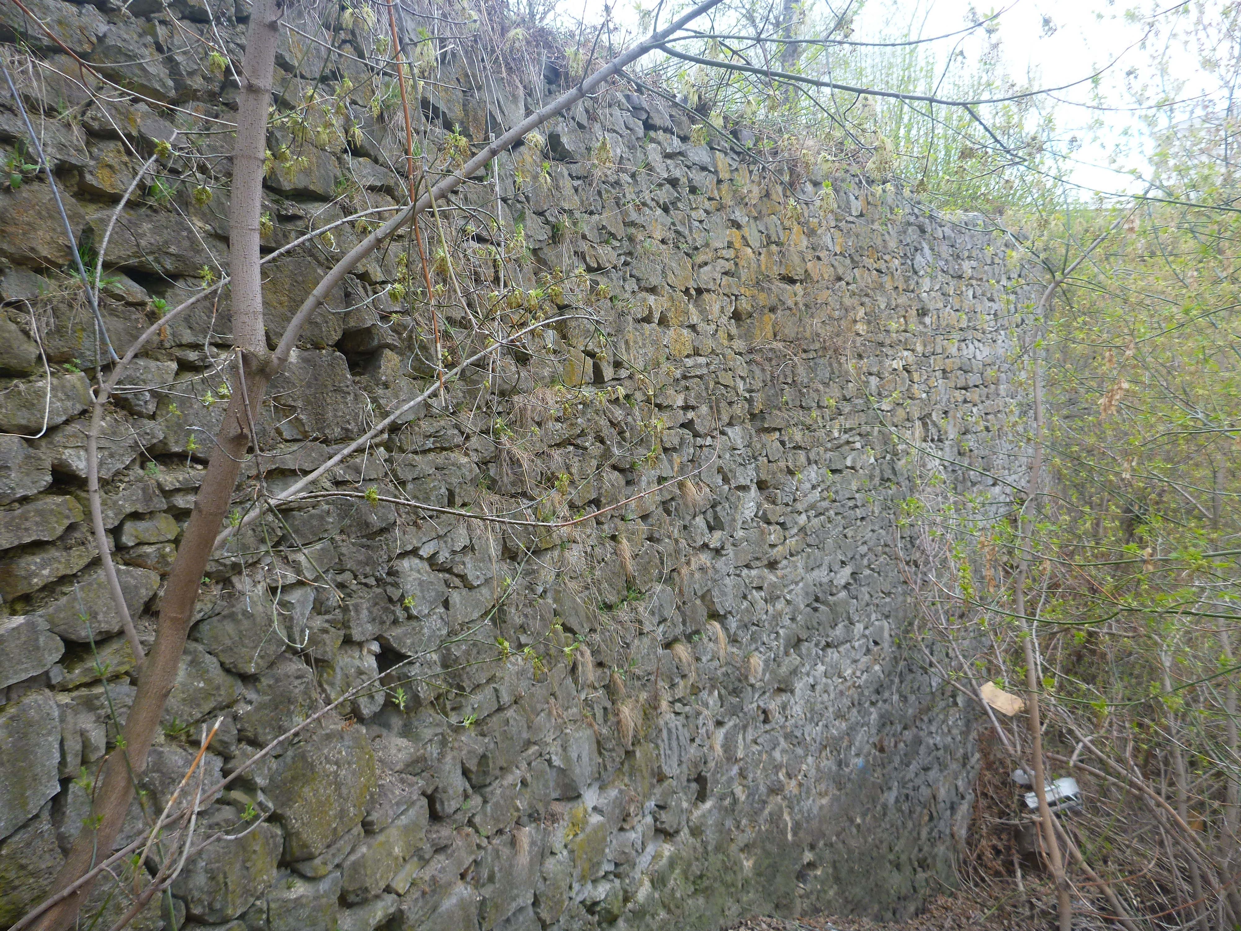 Подпорная стенка (1700-1750 гг) заводской плотины